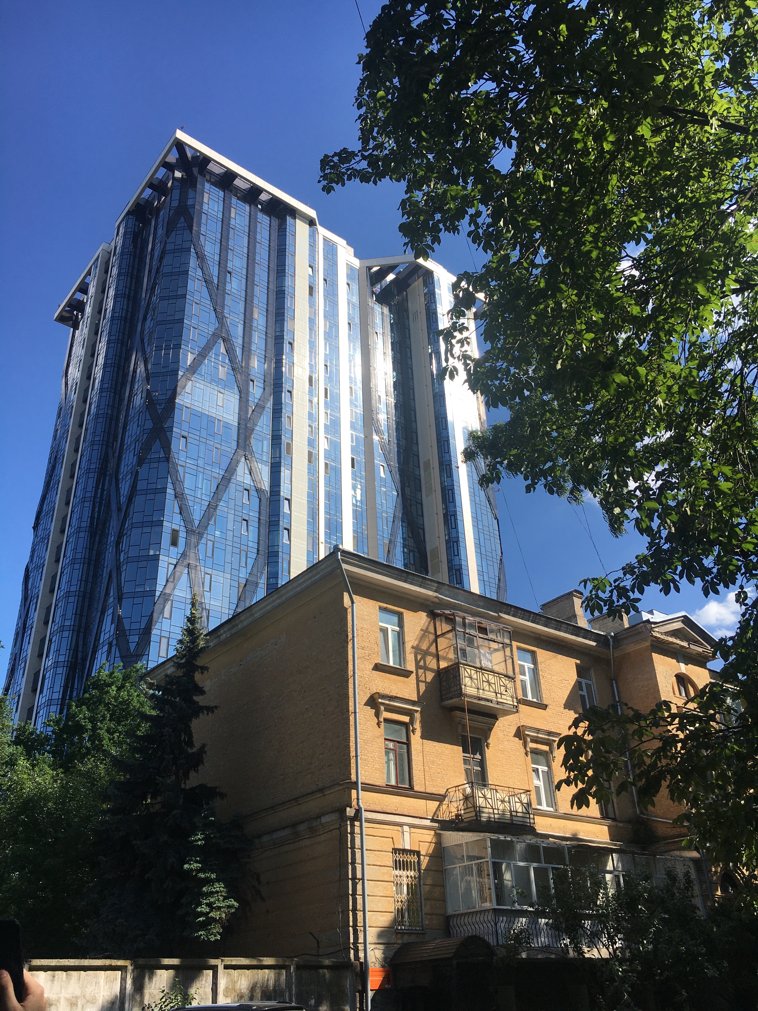 Забудова пострадянської доби на Чоколівці - ЖК Sherwood